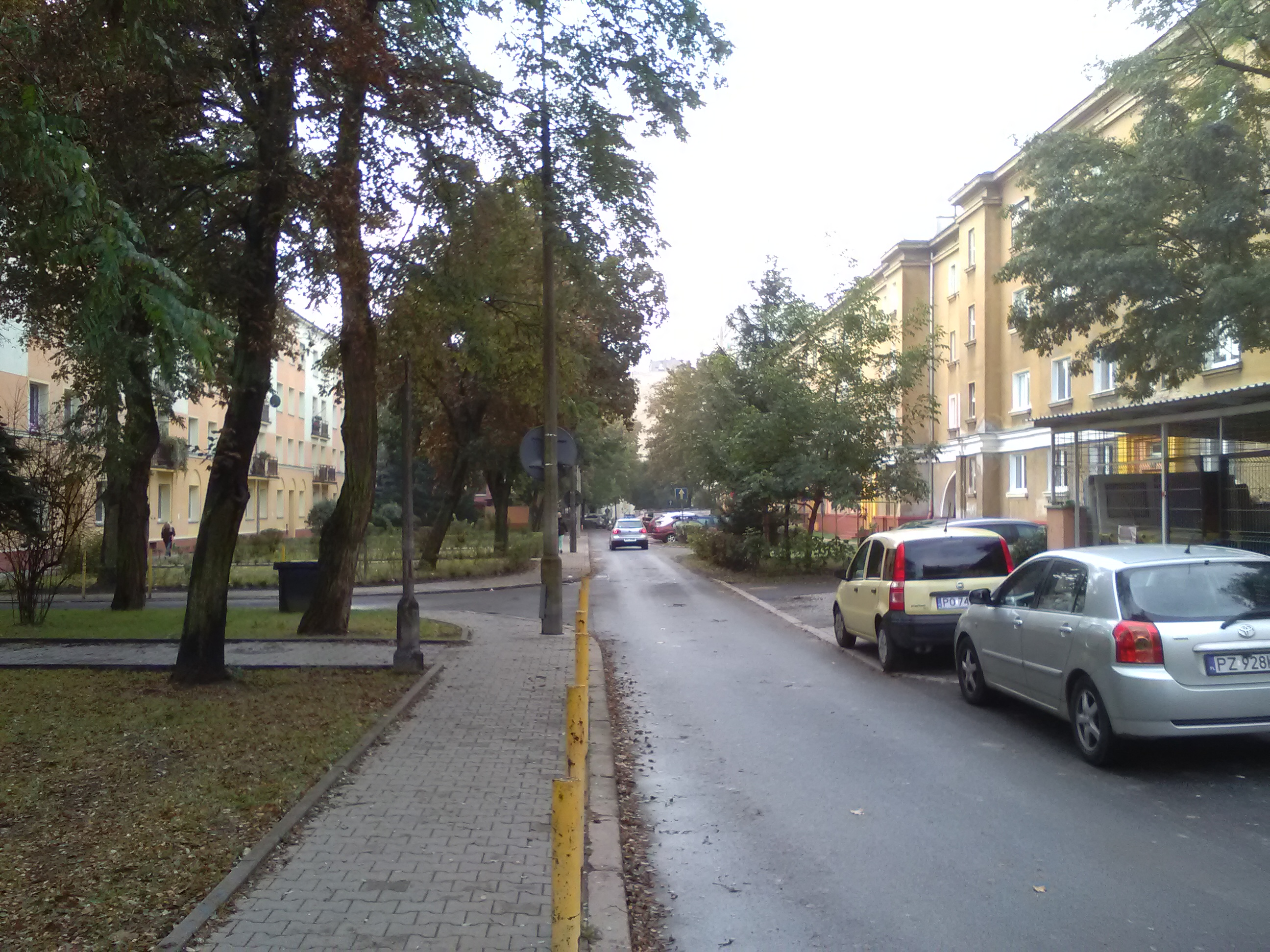 Ulica Bukowa w Poznaniu.